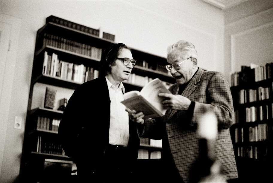 Alexander Schnitte with Alfred Schlee